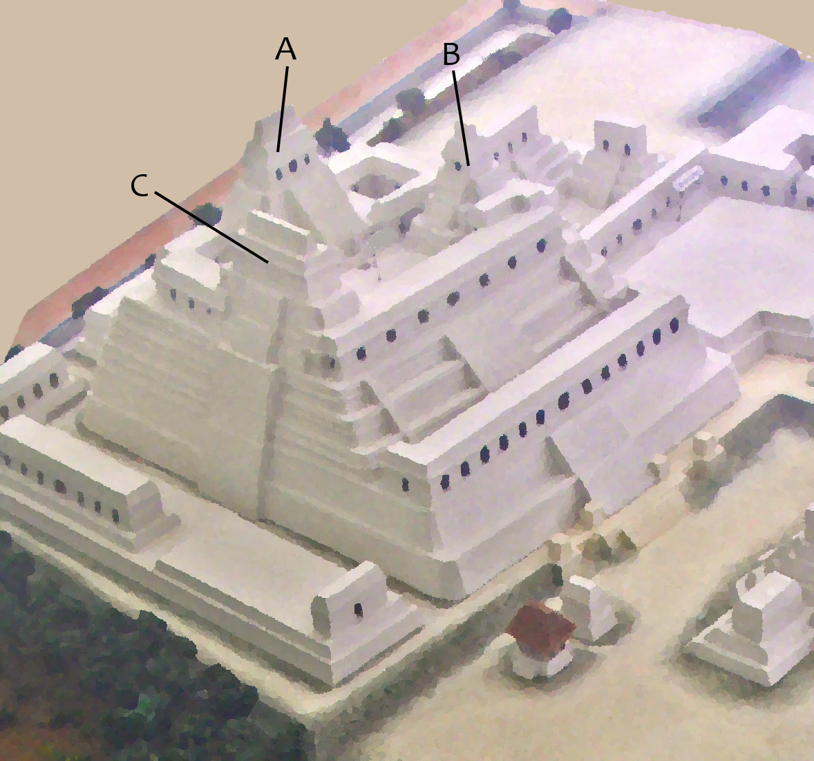 Modelo de pirámide triádica de El Caracol, Belice.